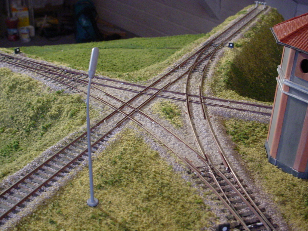 H0-Modell eines Gleisfünfecks. Die zu wendende Lokomotive fährt rückwärts von rechts aus ein, stößt vorwärts in das Stumpfgleis im Bildvordergrund vor, zieht rückwärts in das Stumpfgleis oben rechts, und verlässt den Stern gewendet, also vorwärts, nach links.